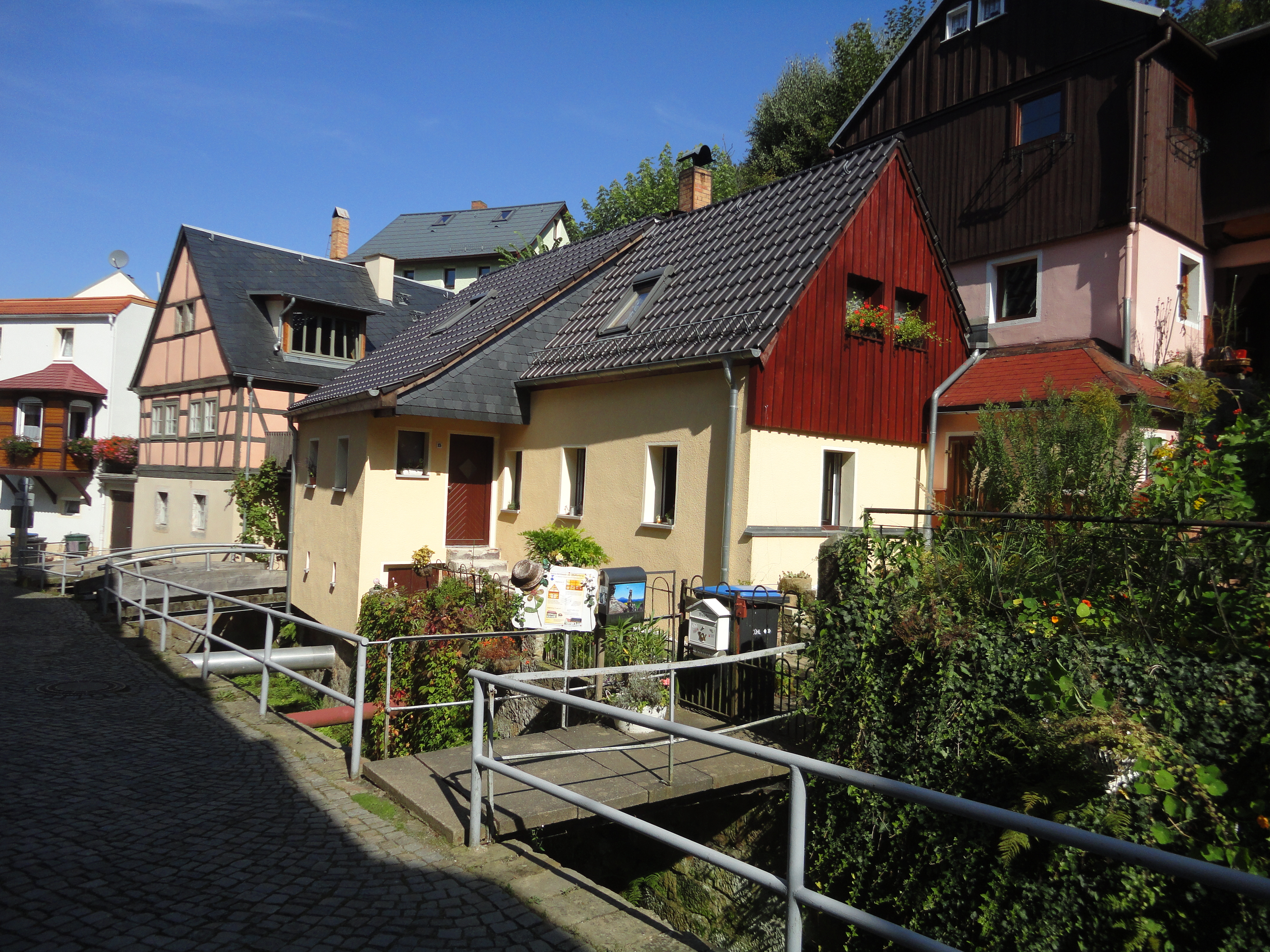 Kulturdenkmalhaus Umgebinde von 1587 in Königstein (Sächsische Schweiz) Kulturdenkmal der besonderen Bauart, Pfaffenberg 15